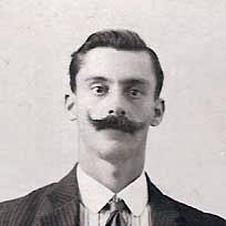 Champion du monde de gymnastique (photo de famille prise vers 1907)